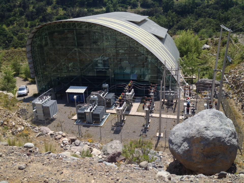 Casa de máquinas de la Central Hidroeléctrica Guayacán